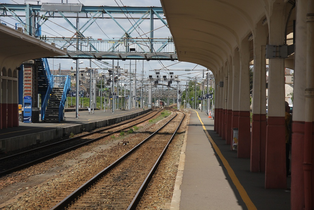 Vue des voies en direction de Brest, Saint-Brieuc, France.